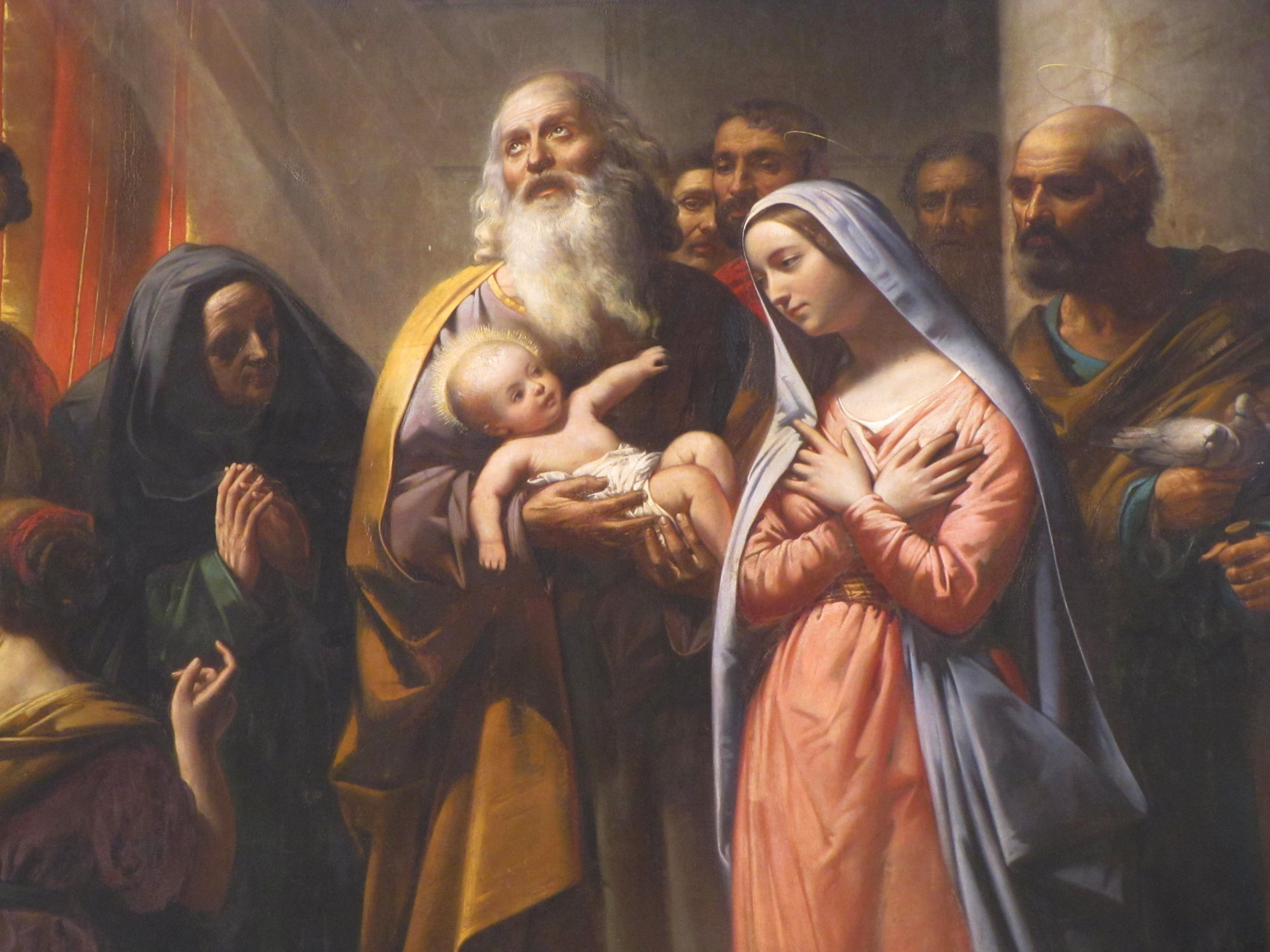 Alsace, Bas-Rhin, Église Saints-Pierre-et-Paul de Hochfelden (IA67009233). Tableau d'autel "Présentation de Jésus au Temple" (Inconnu, huile sur toile, 250cm de large, XIXe)